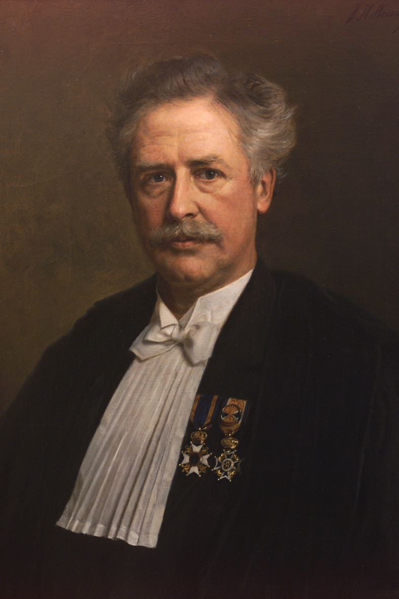 Herman Snellen - J. Neuman pinxit. De schilder Neuman stierf in 1898, dus geen auteursrecht meer. Herkomst van het schilderij: eigendom.